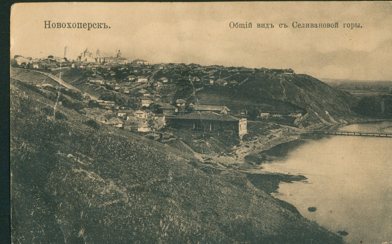 Новохоперск. Общий вид с Селивановой горы.jpg